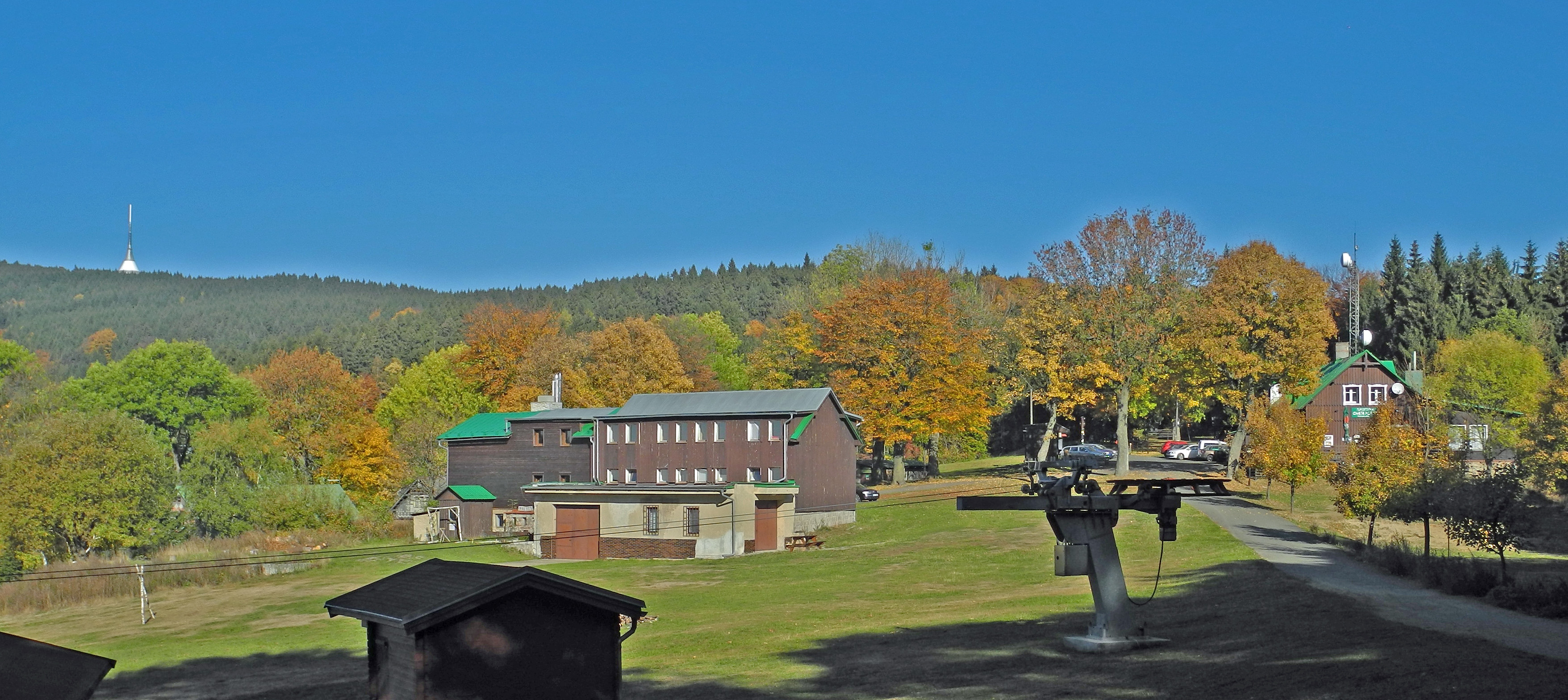 Auf dem Jeschken-Kammweg: Pláně pod Ještědem (Kühneibaude) (785 m)